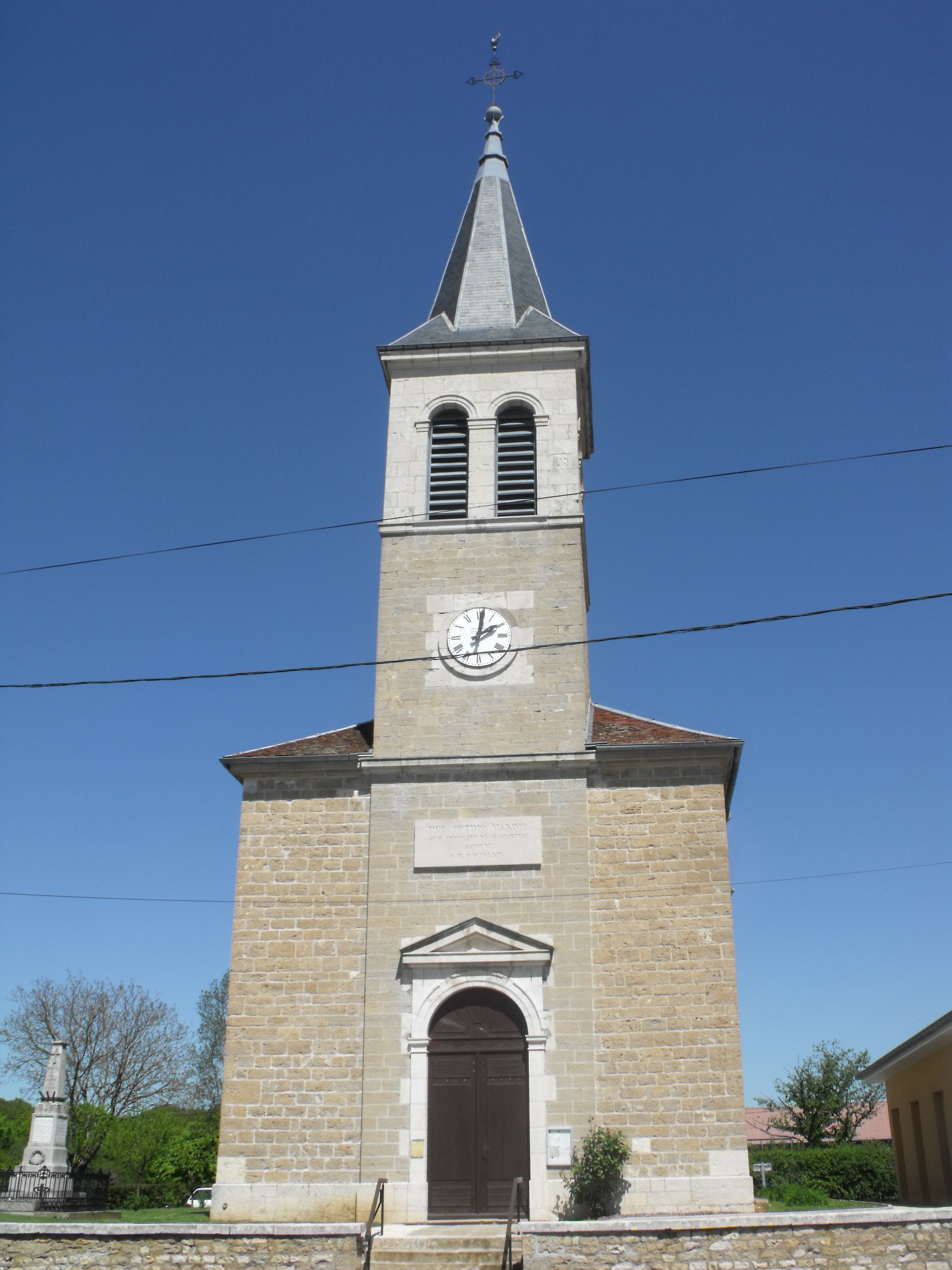 Eglise de Berthelange, Doubs, France